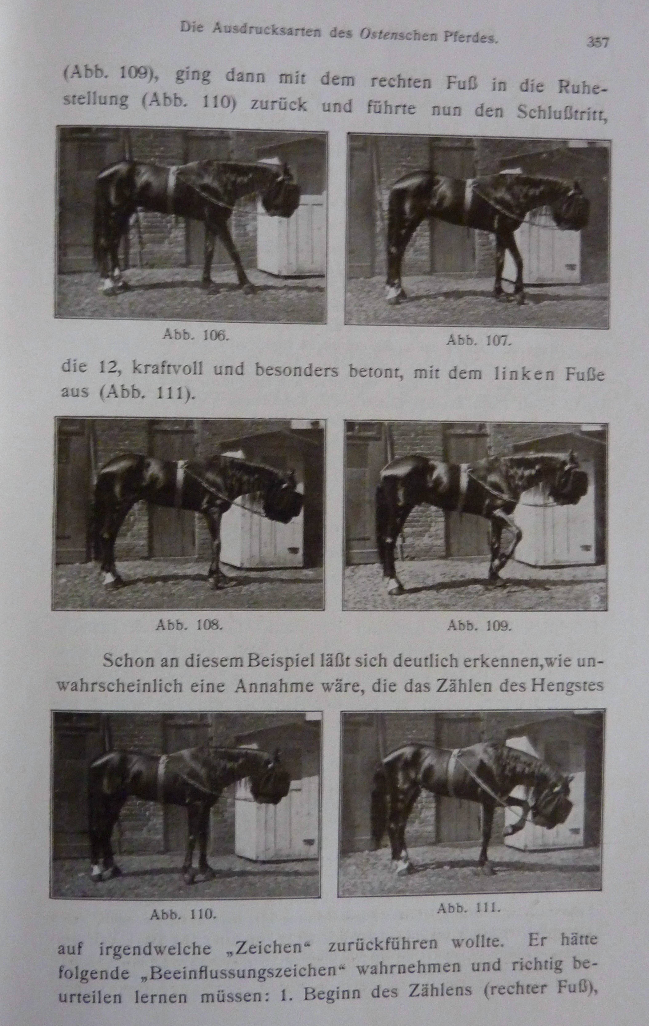 der kluge Hans bei einer Zahlenangabe